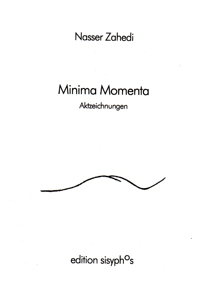 Das Titelblatt des Buches "Minima Momenta - Aktzeichnungen"